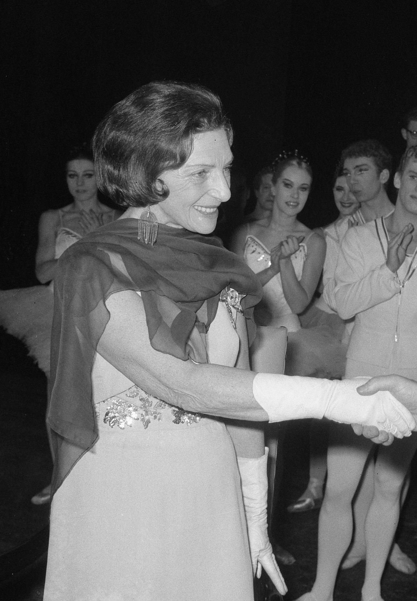 Sonia Gaskell officier, na de voorstelling ontving zij de versierselen van Minister Vrolijk